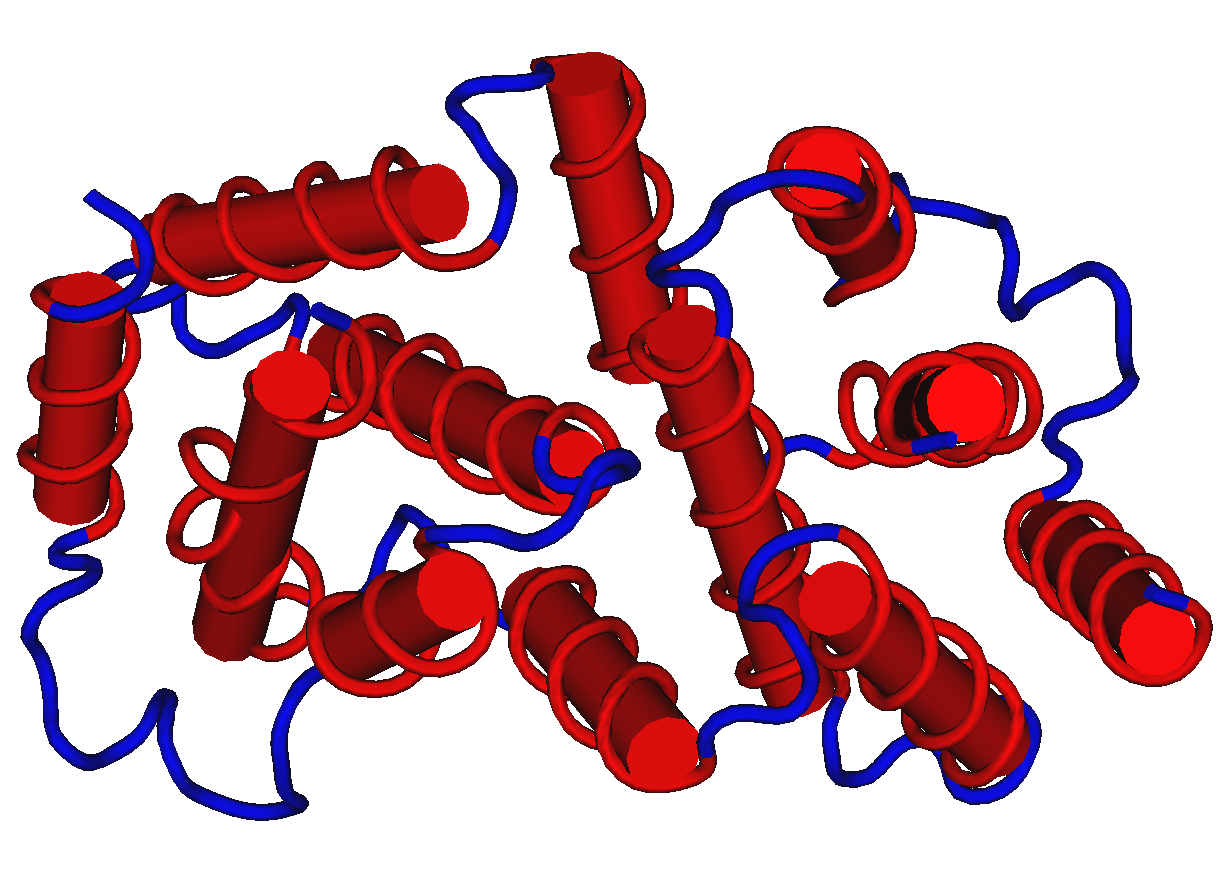 1D9C_Bovine-Interferon-Gamma